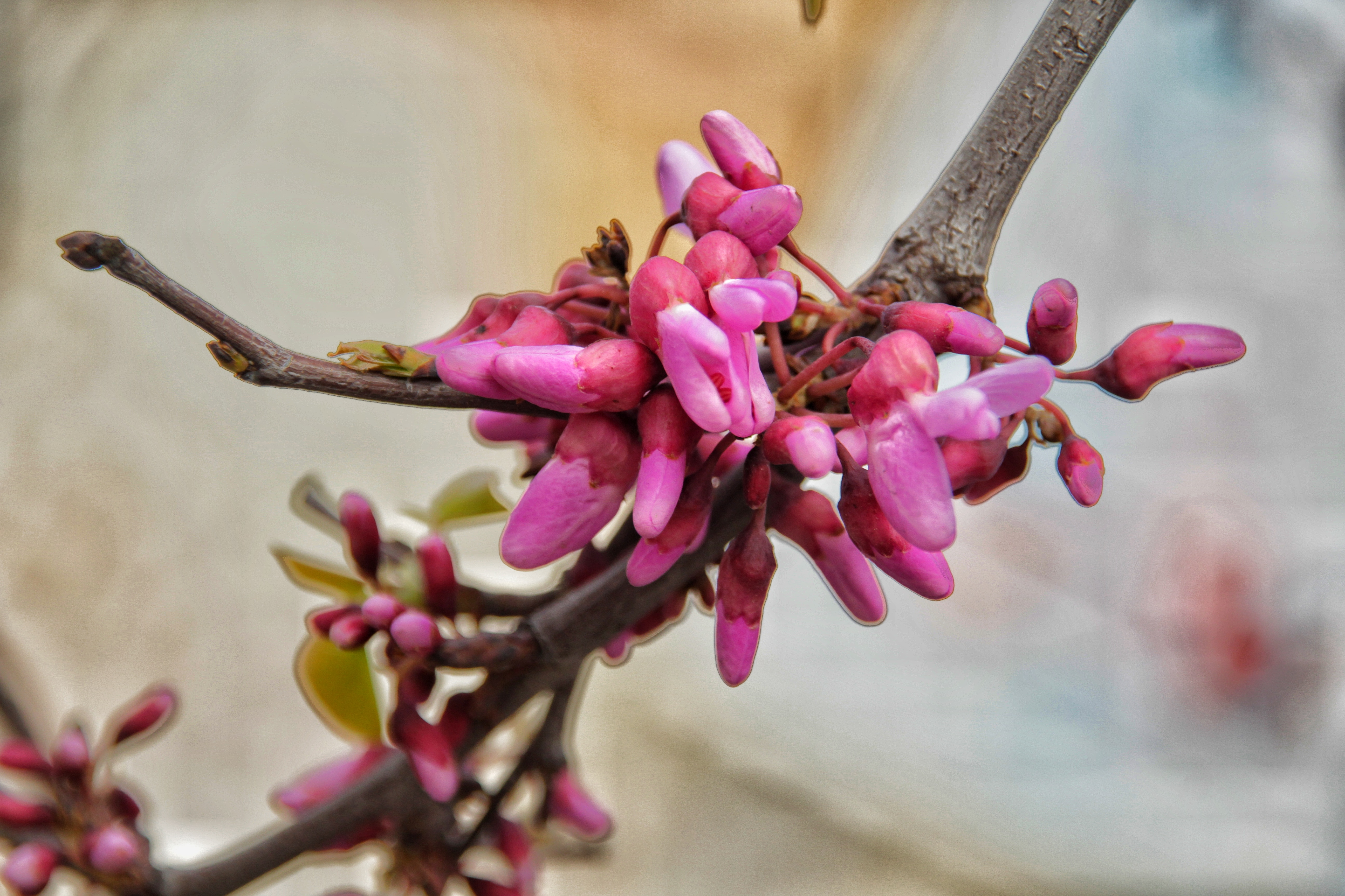 Fiori del cercis siliquastrum più comunemente noto come albero di Giuda